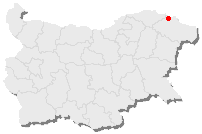 Ardalı haritası